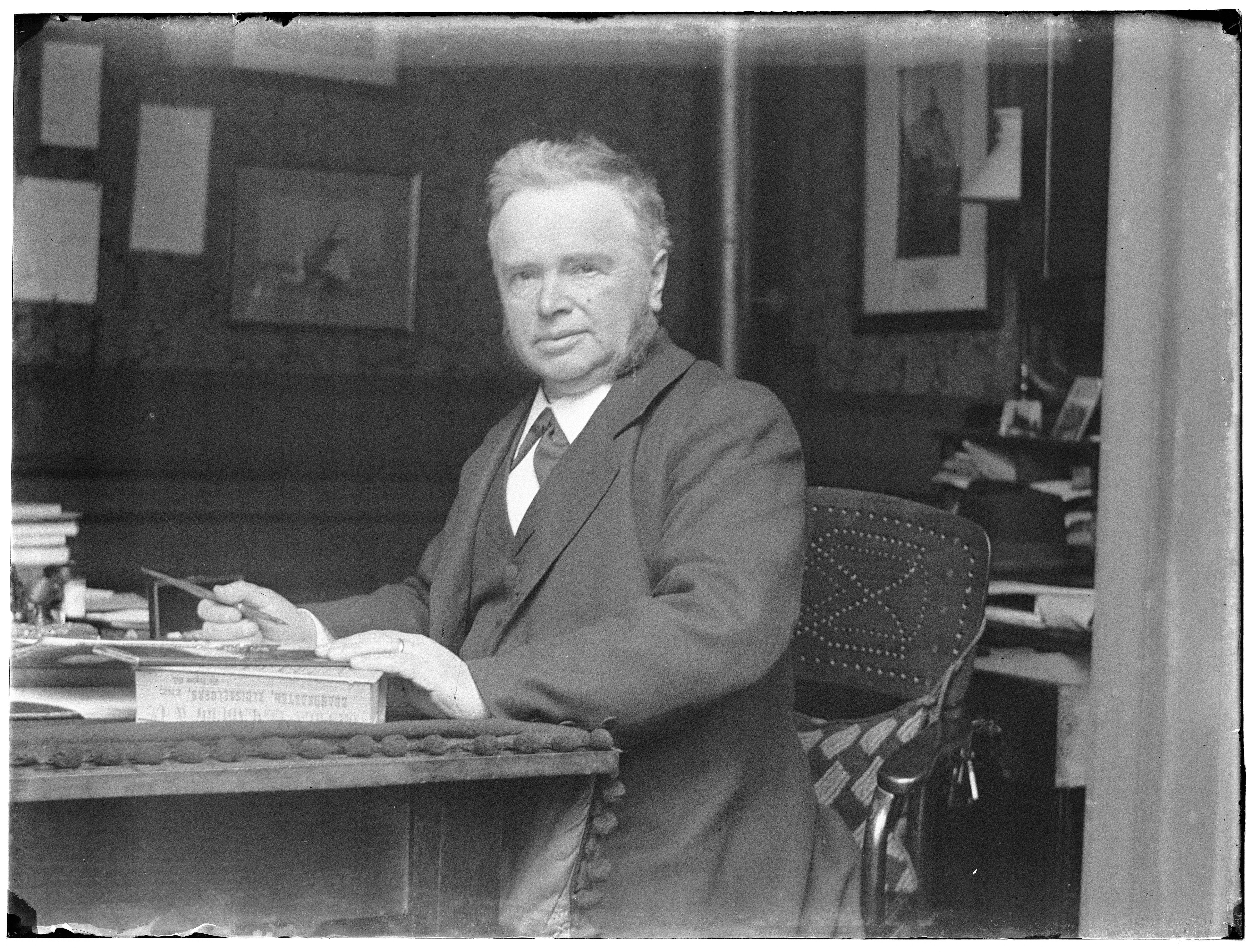 Portret van Jacob Anton Tours (1843-1918), eerste directeur van "Ons Huis" te Amsterdam